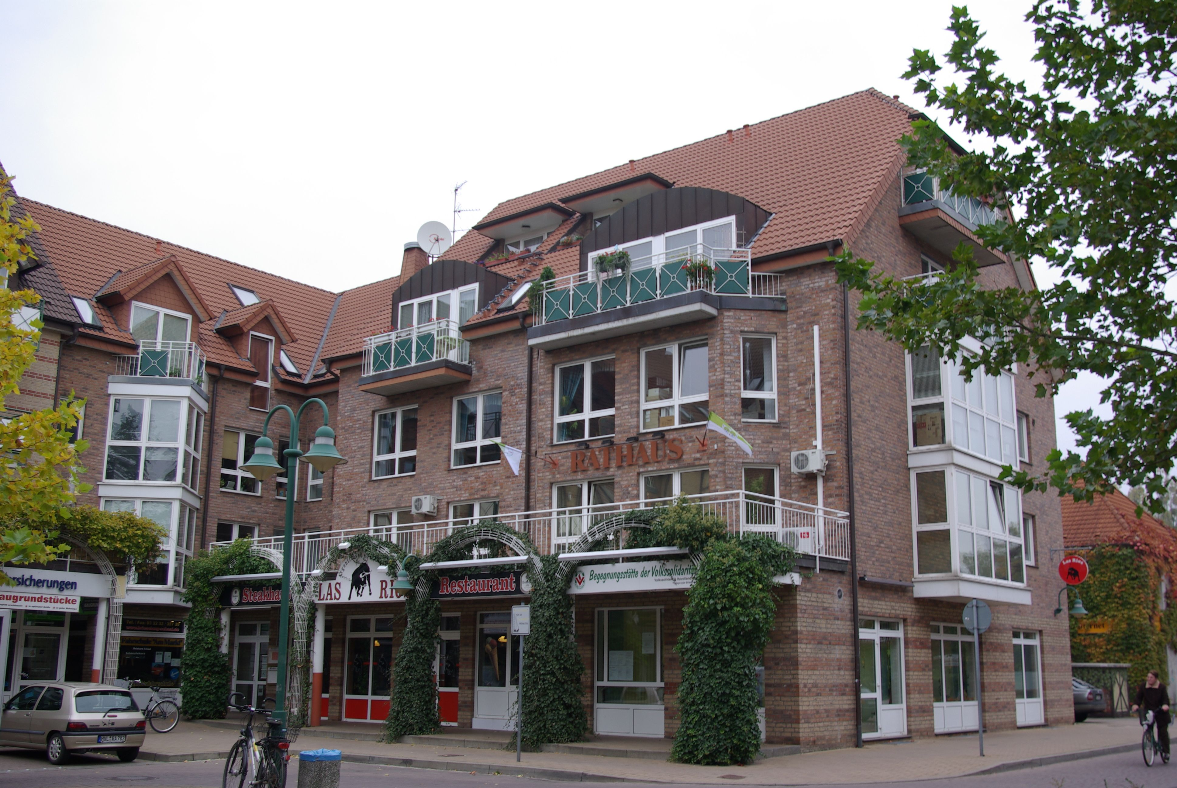 Brieselang in Brandenburg. Das Rathaus in Brieselang ist umgeben von Geschäften. Es liegt im südlichen Teil des Ortes.